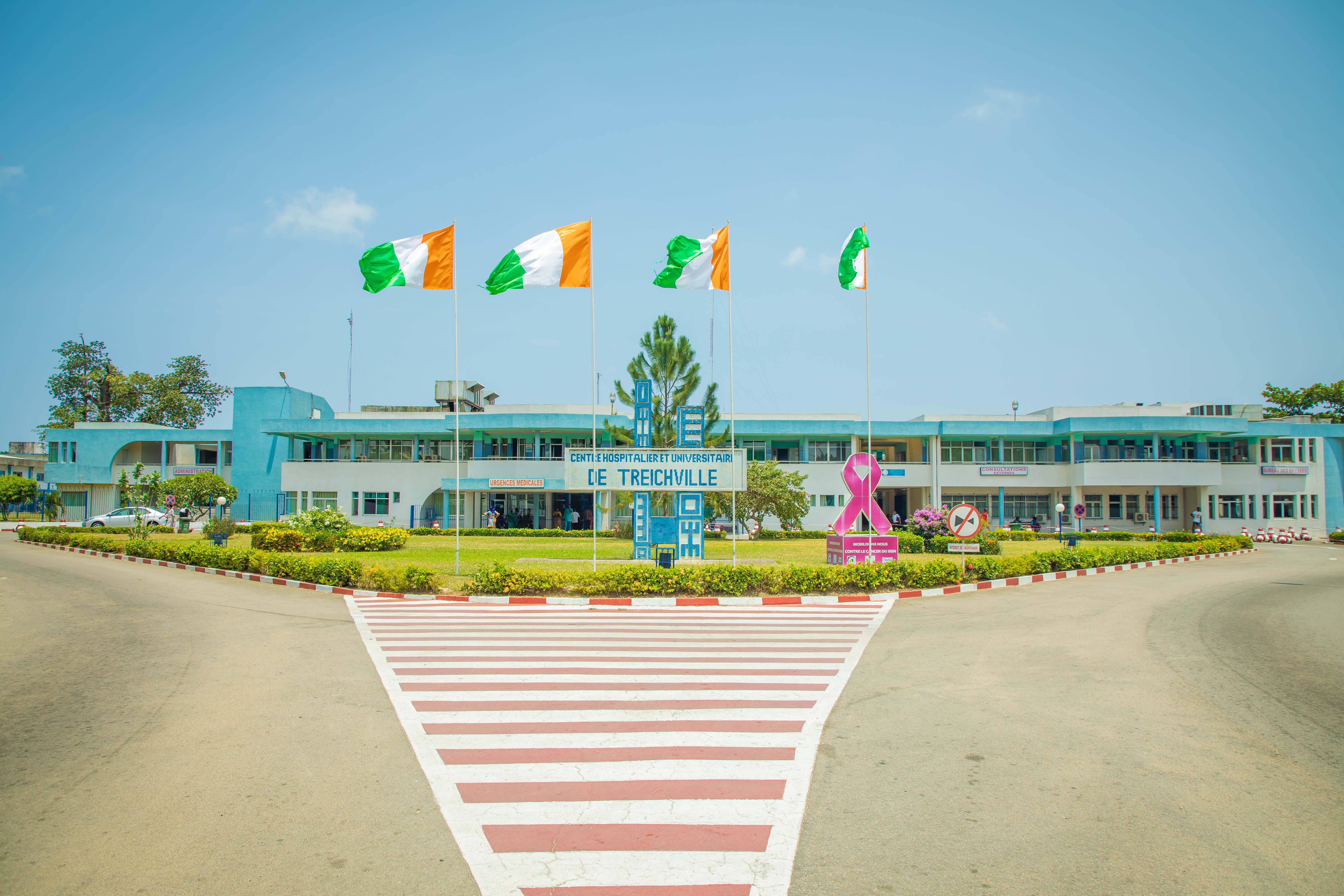 vu des urgences médicales à l'entrée du CHU